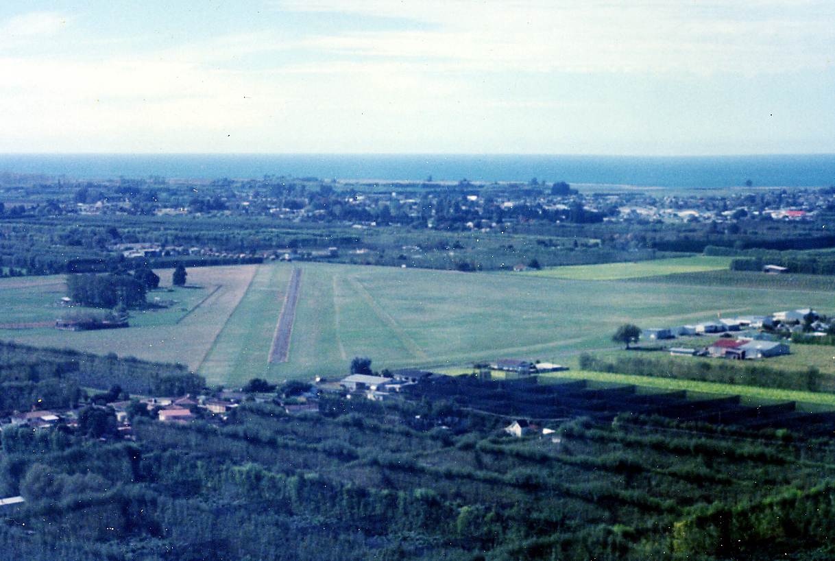 Landing at Motueka